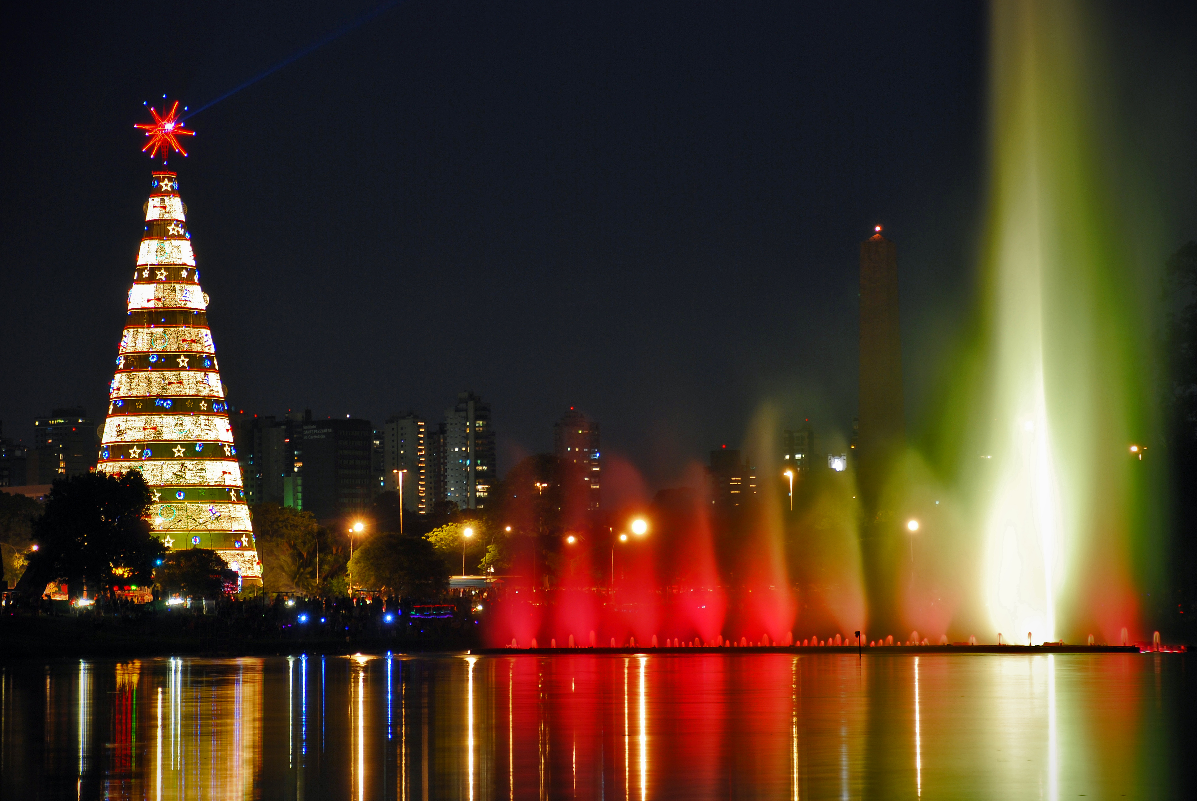 Parque Ibirapuera at Christmas night